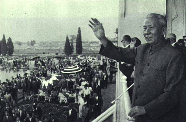 1966-06 1966年刘少奇率团访问巴基斯坦